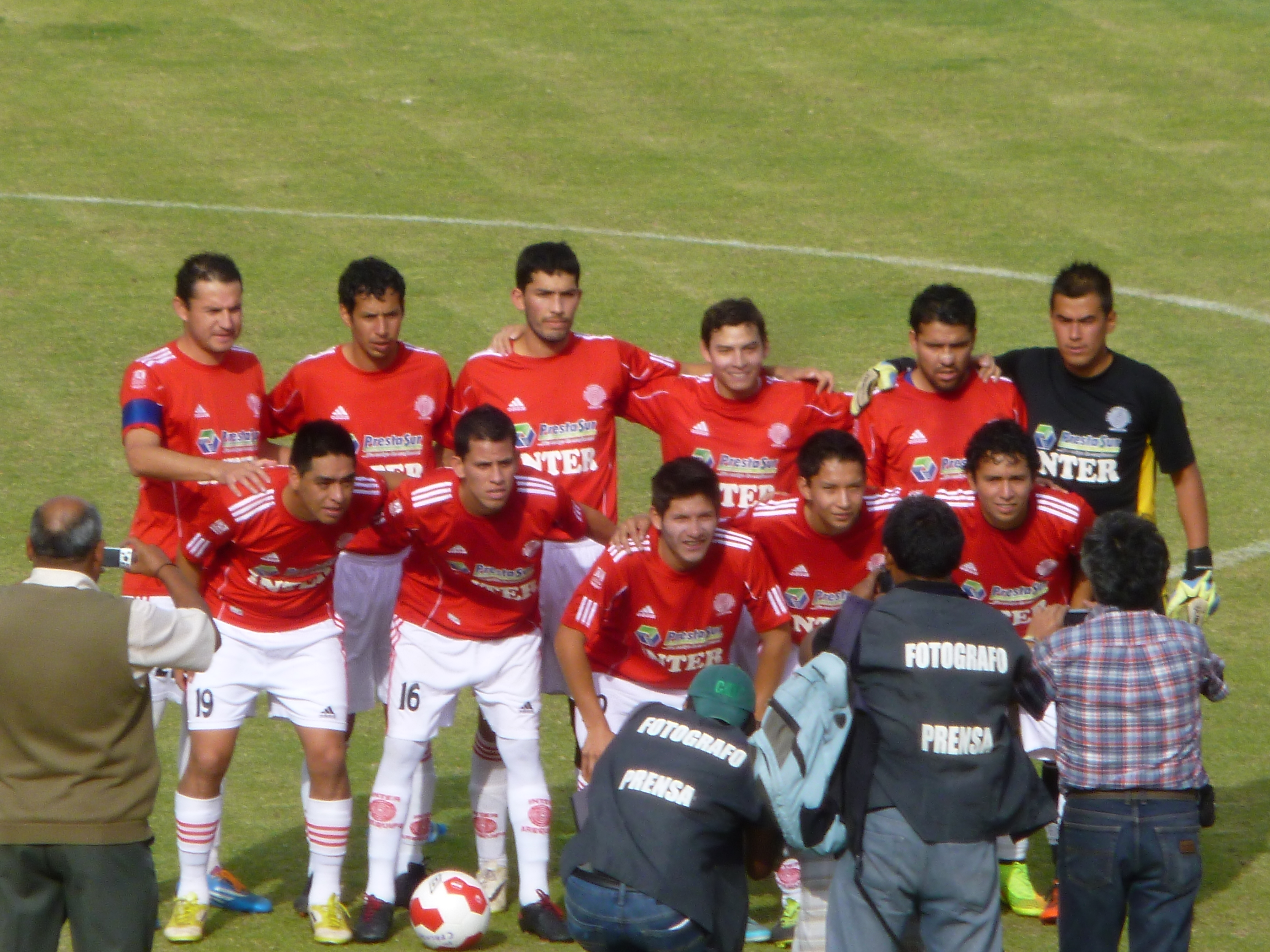 Equipo del Club Internacional, participante de la Etapa Departamental de Arequipa 2014.